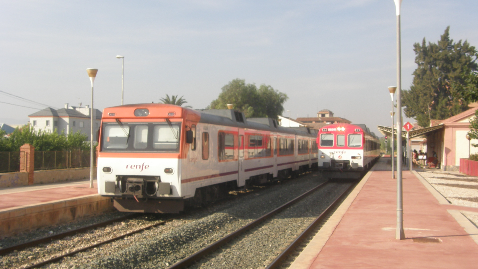 Unidades 592 cruzando en la estación de Beniel (Murcia). La de la izquierda (subserie 592-200) efectúa un servicio REX Valencia - Murcia y la de la derecha, un Cercanías Murcia-Alicante.